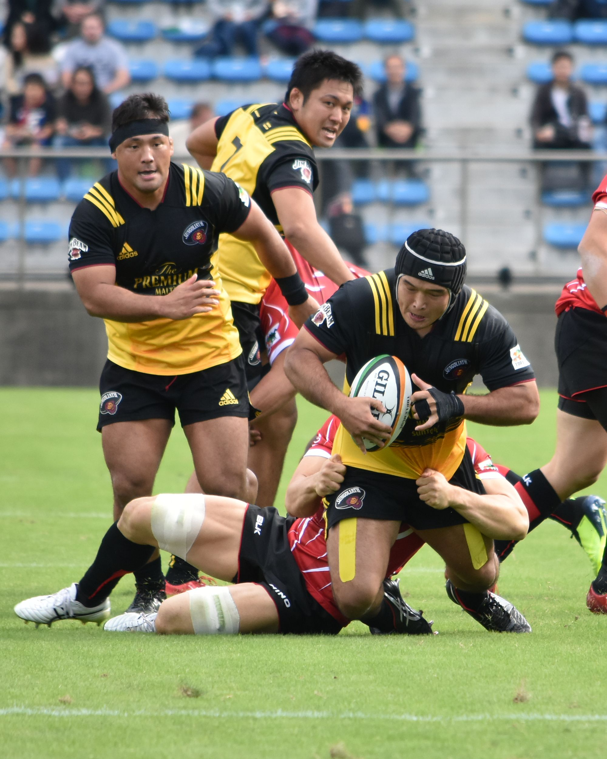 垣永 真之介